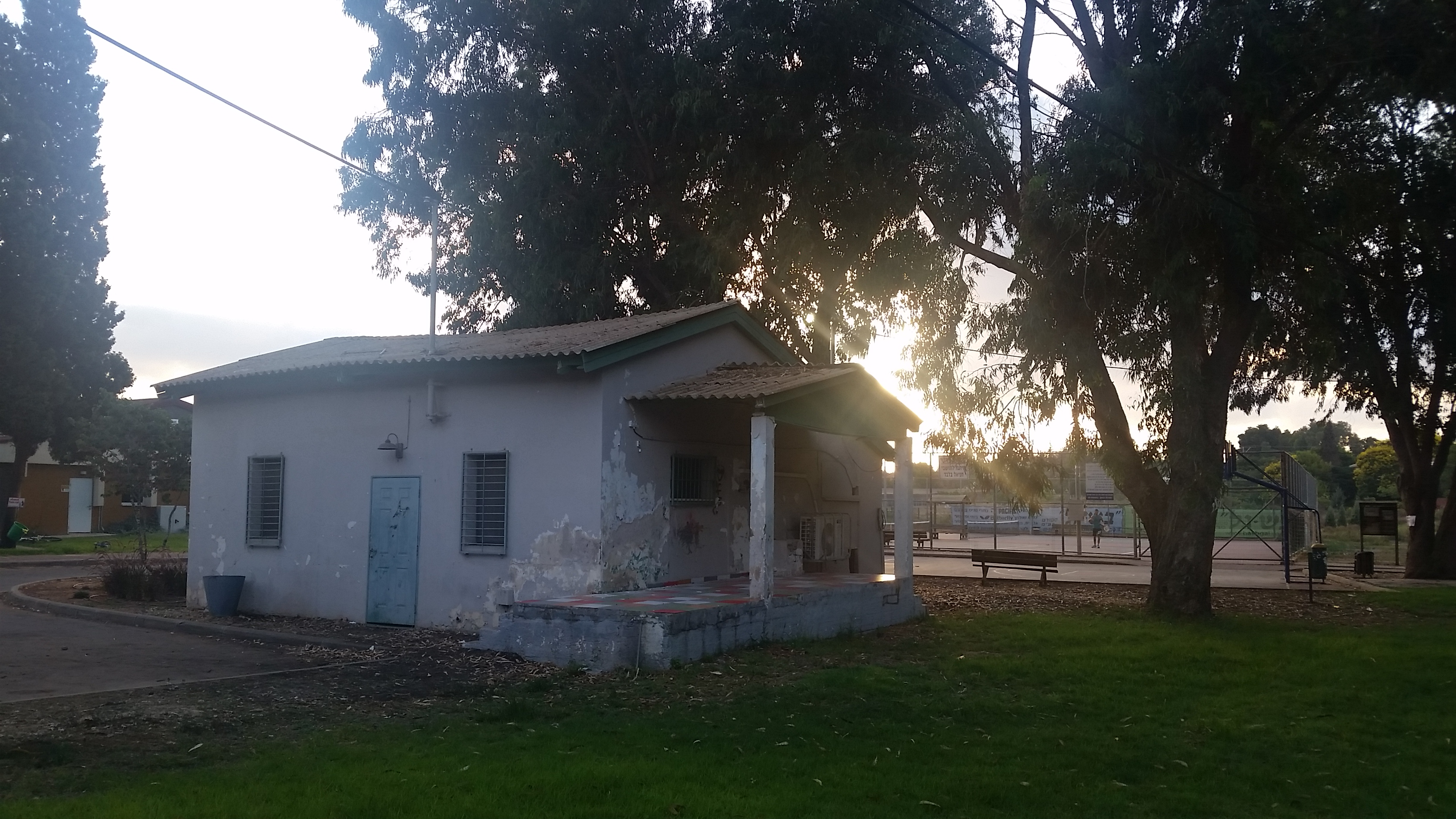 המחלבה בחניאל, כיום מועדון נוער